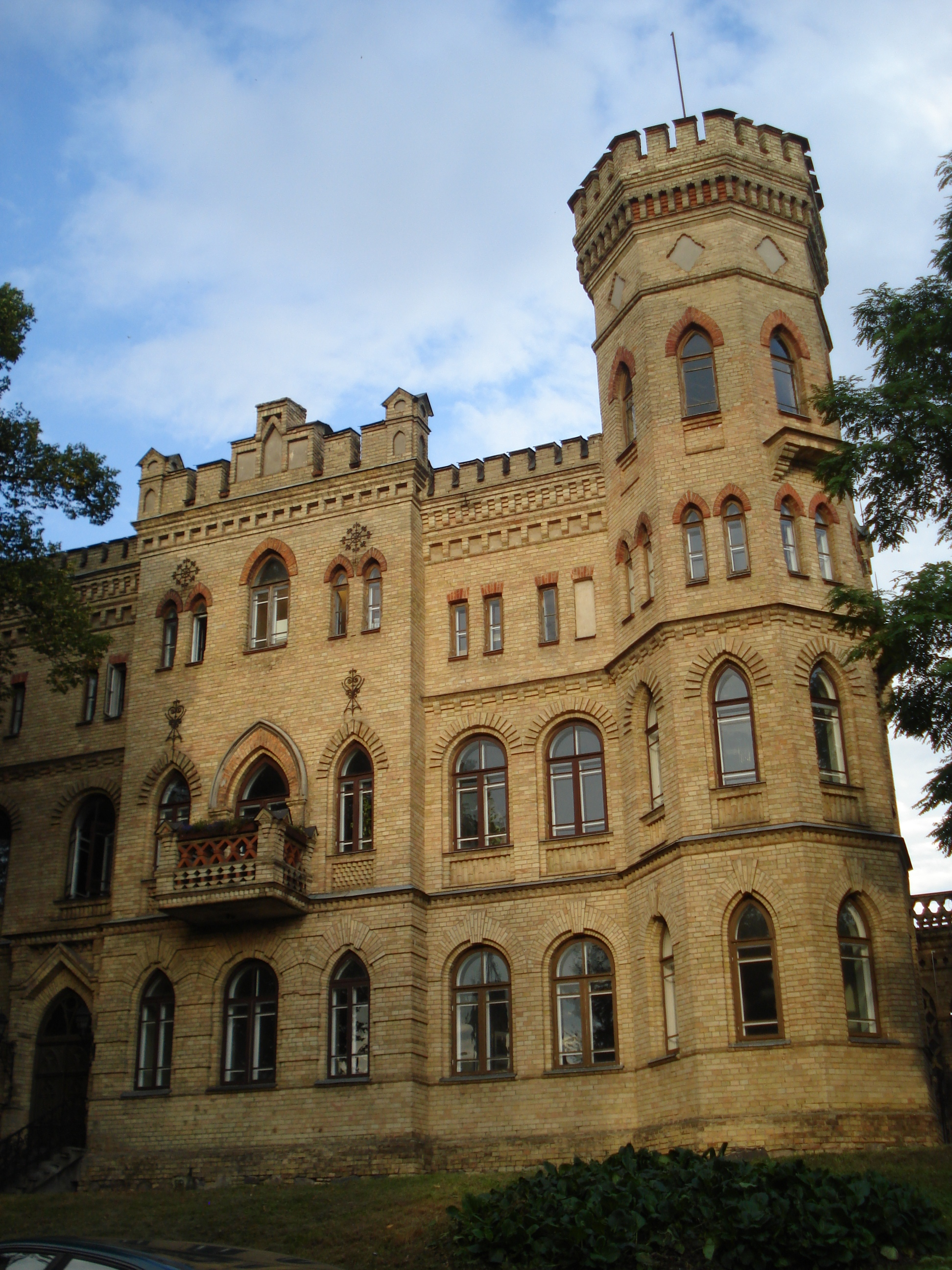 House of medician Hilary Raduszkiewicz built by Julian Januszewski (1894) in Vilnius (Kalvarijų g. 1; Architektų sąjungos būstinė)